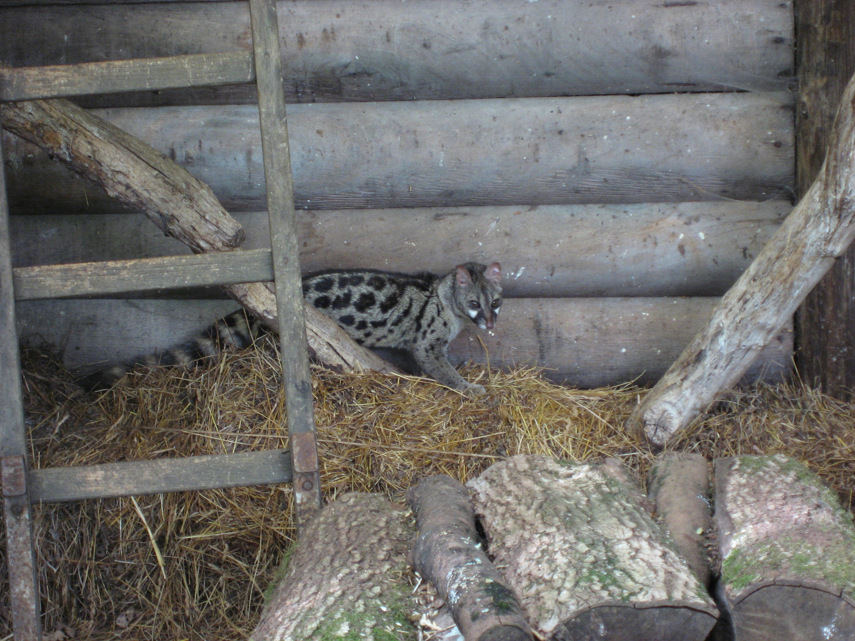 Genetta genetta in Zoodyssée